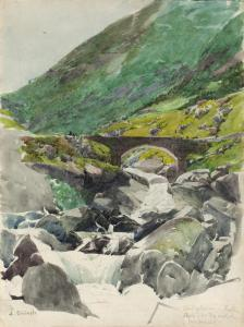 August Blunck In den Bergen